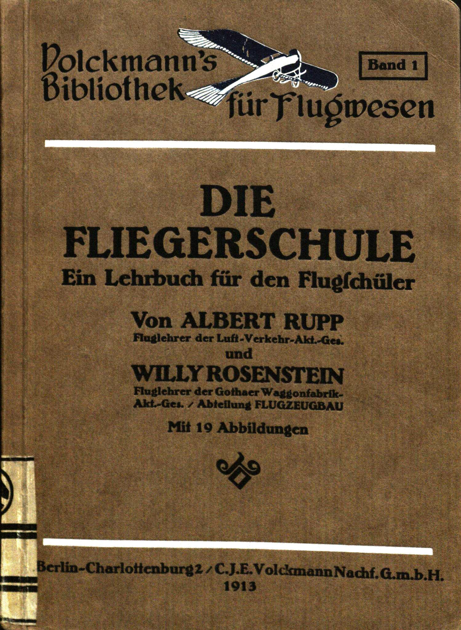 Willy Rosenstein/Albert Rupp: Die Fliegerschule. Ein Lehrbuch für den Flugschüler, Volckmann, Berlin 1913, Buchcover